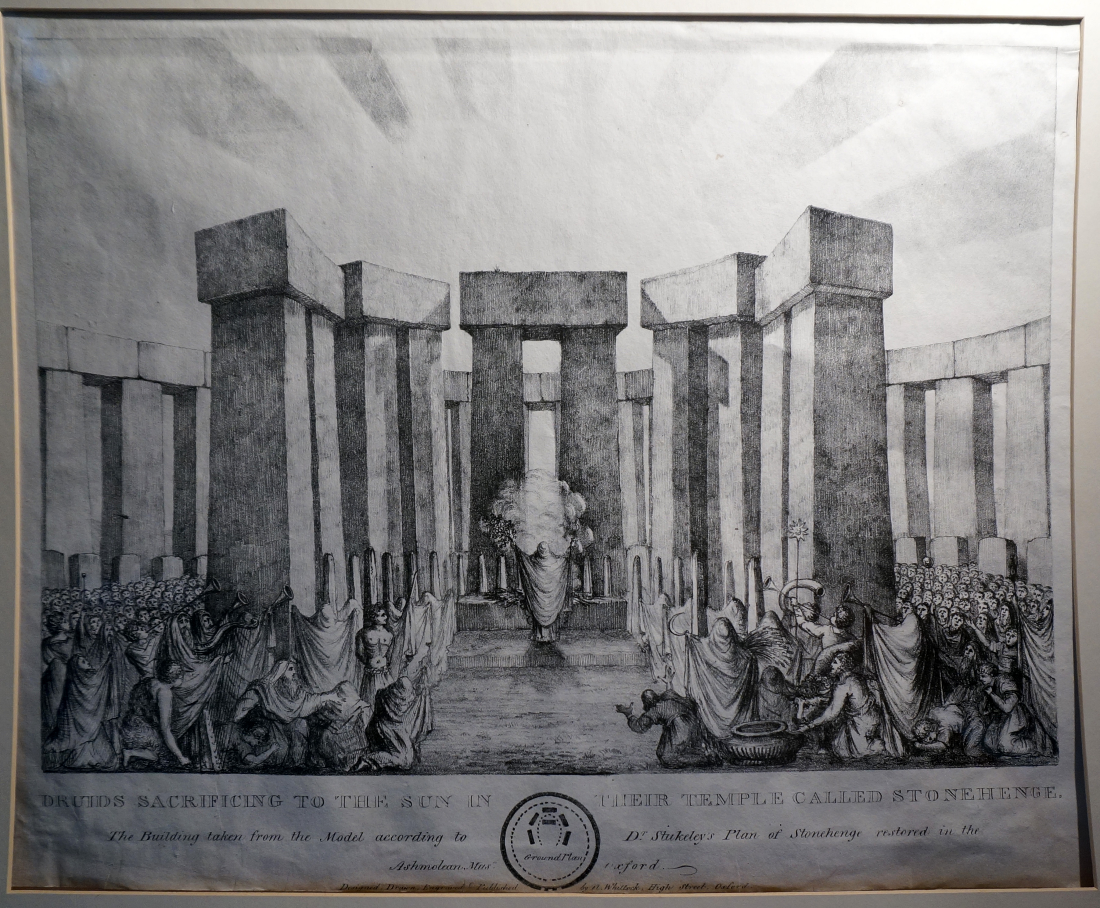 Stonehenge, dessin de Stukley publié à Oxford .